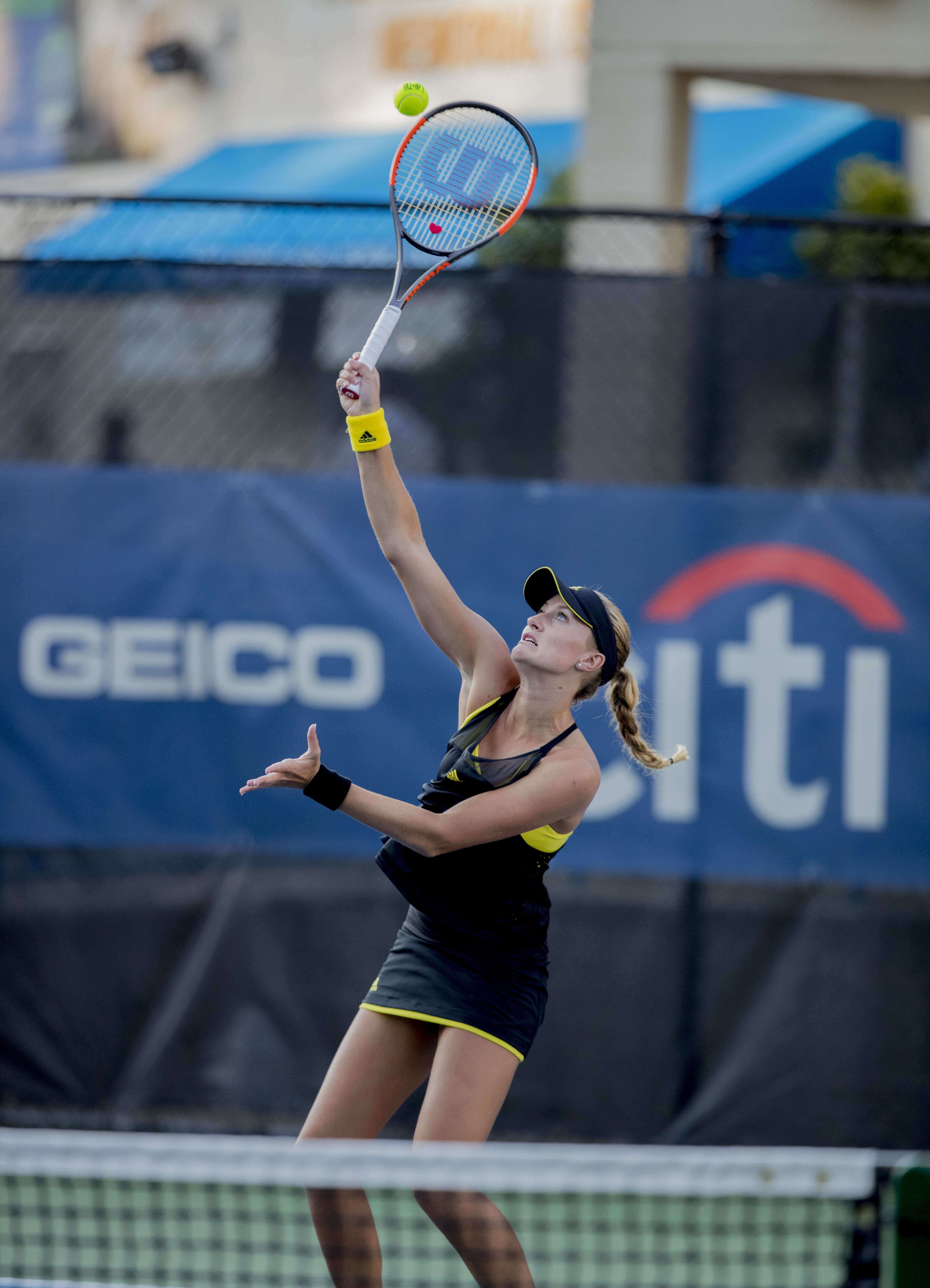 Citi Open Tennis 2017